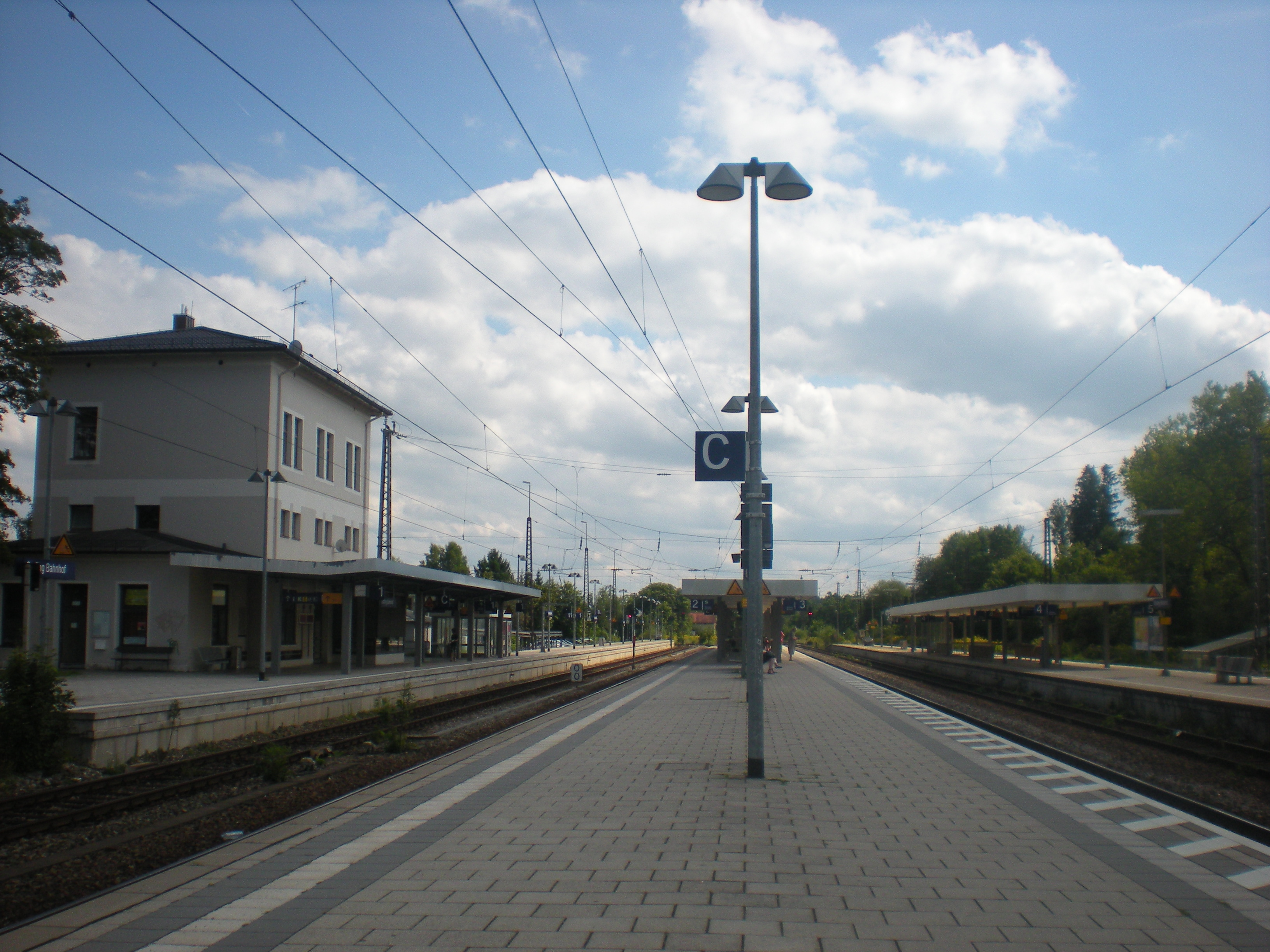 Bahnsteige des Vororts Grafing Bahnhof